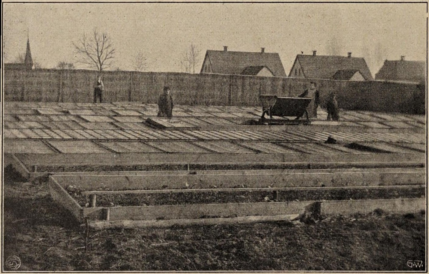 Obstplantage Wilhelm de Joncheere, Cleve am Niederrhein